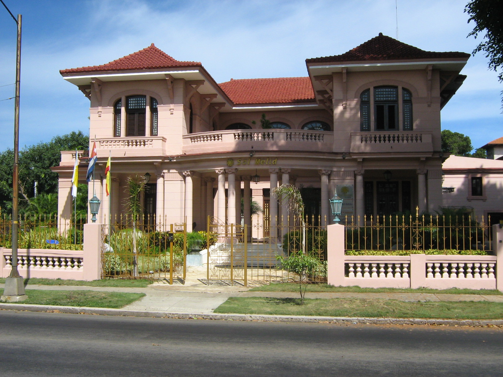 Sol Melia en La Habana (quinta avenida)